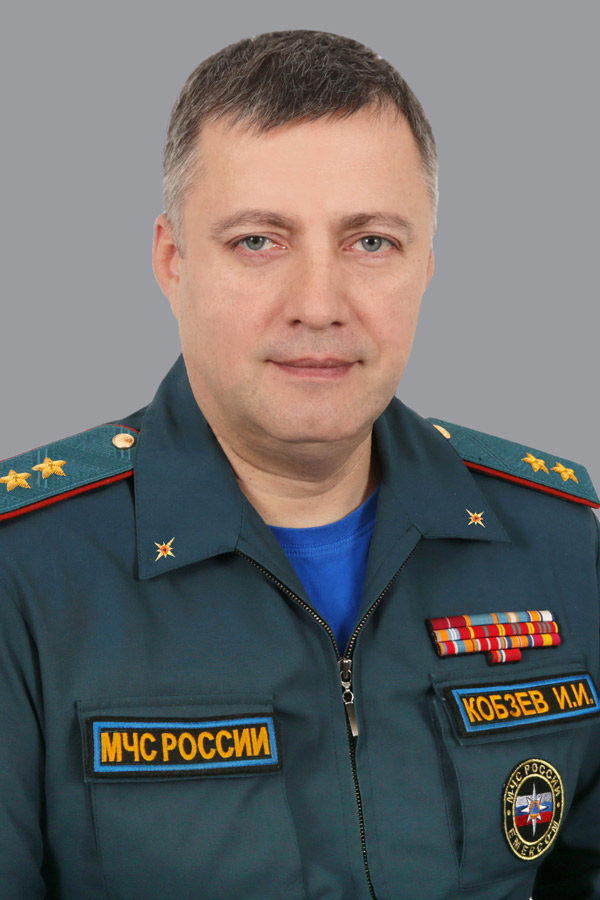 Кобзев Игорь Иванович.